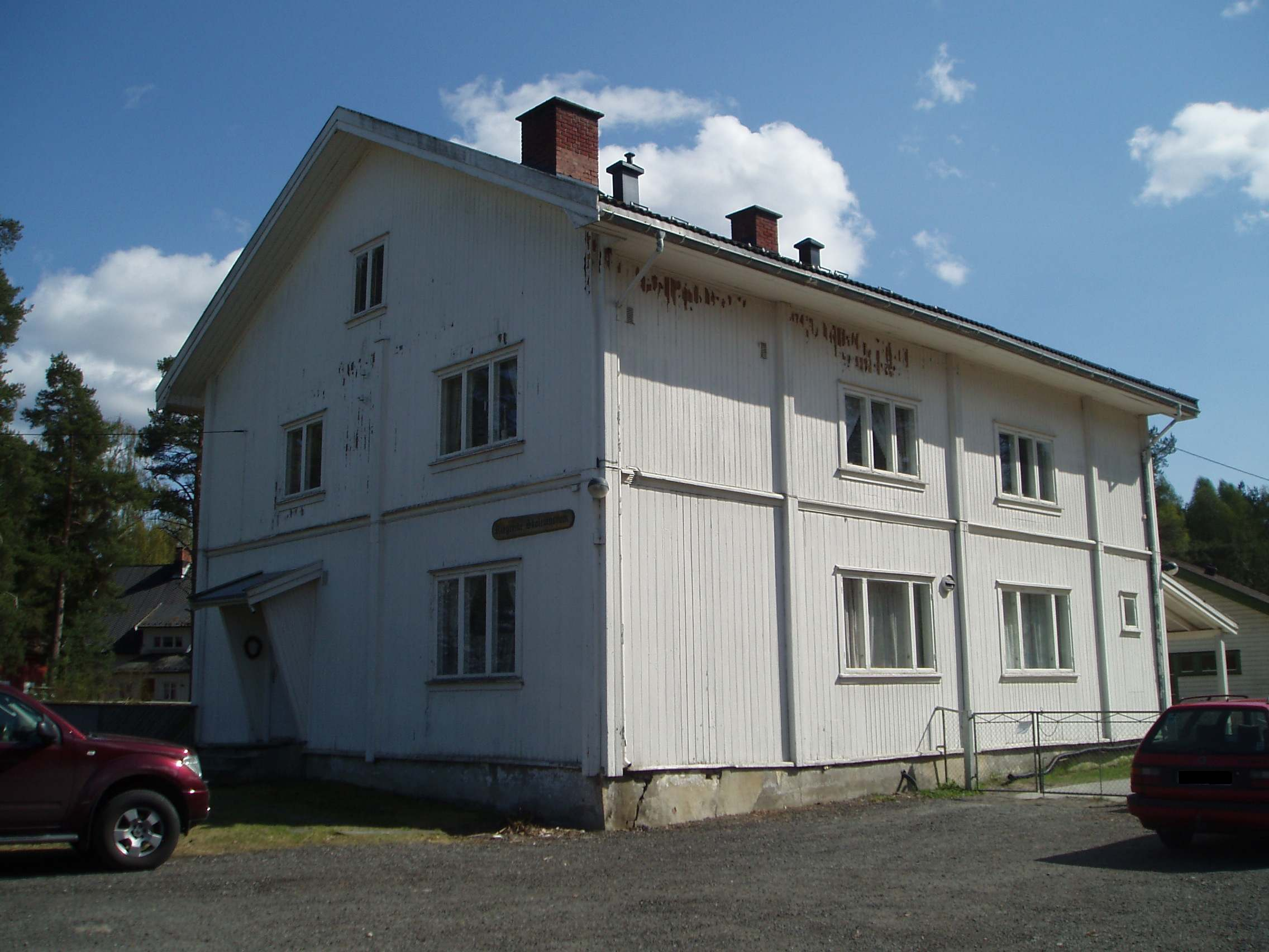 Veien gamle skole i Ringerike kommune i Buskerud fylke i Norge. Skolen er i dag skolemuseum.